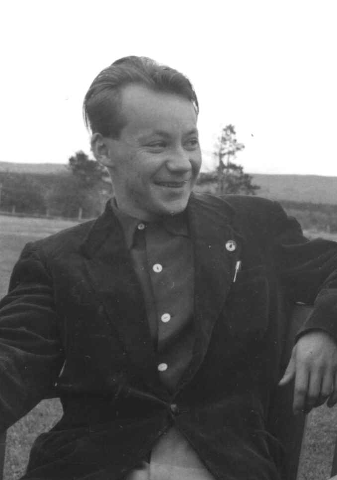 Portrett av kunstner Iver Jåks og dr. A. Nesheim på nordisk samemøte, aug. 1956.